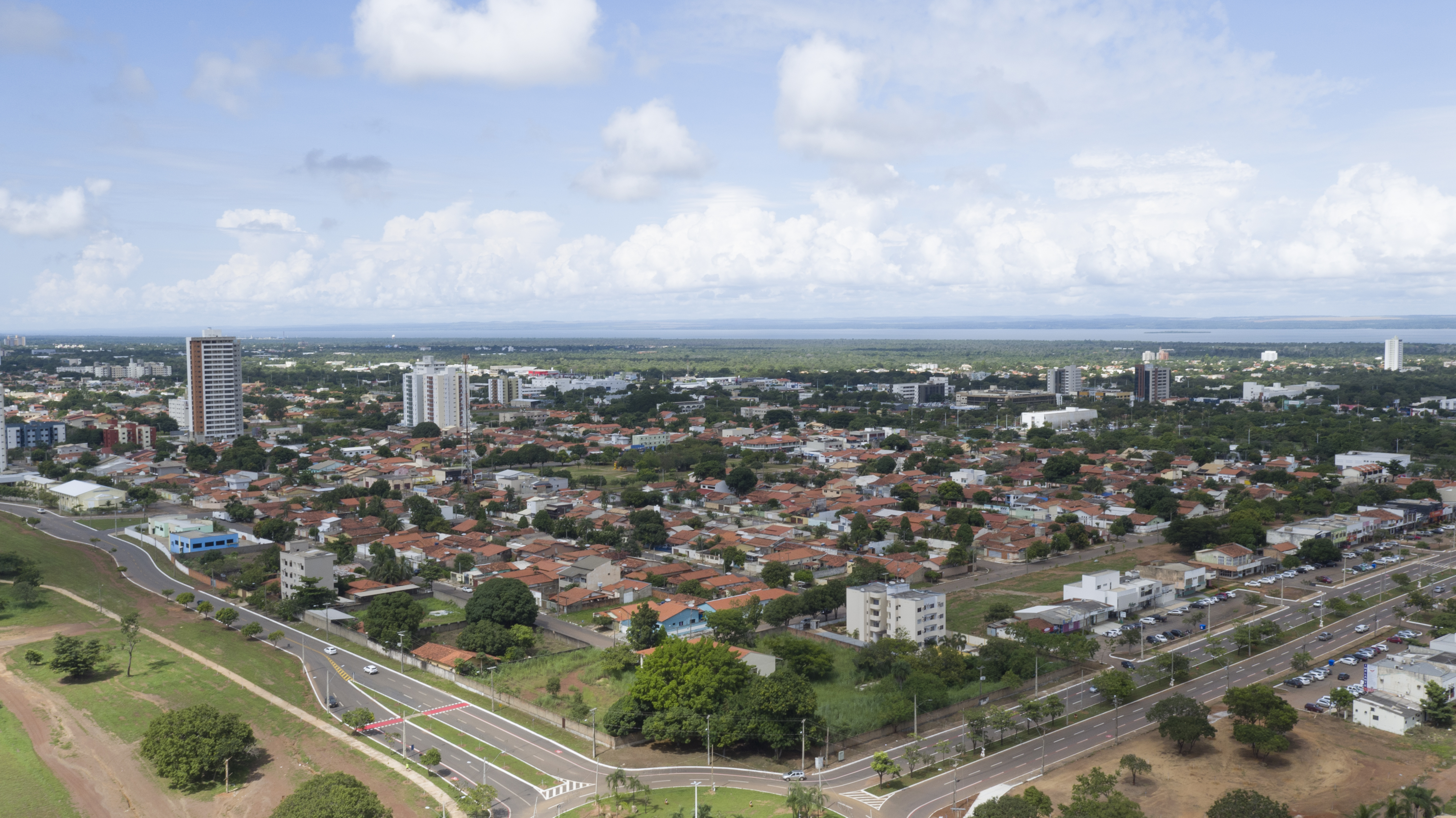 Crédito obrigatório: Flávio André - MTUR